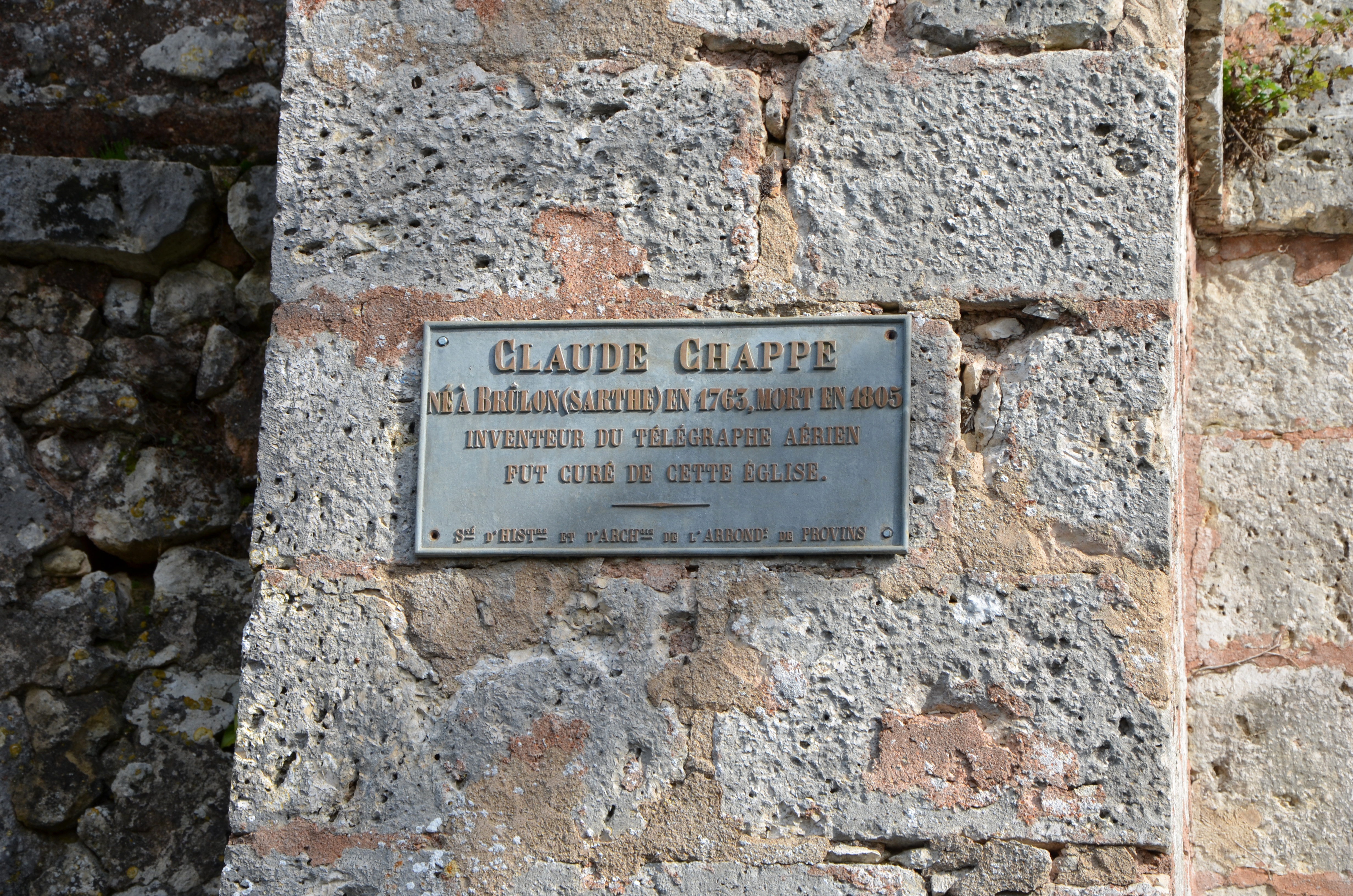 Eglise de Chalautre-la-Petite, Seine-et-Marne, Ile de France, France